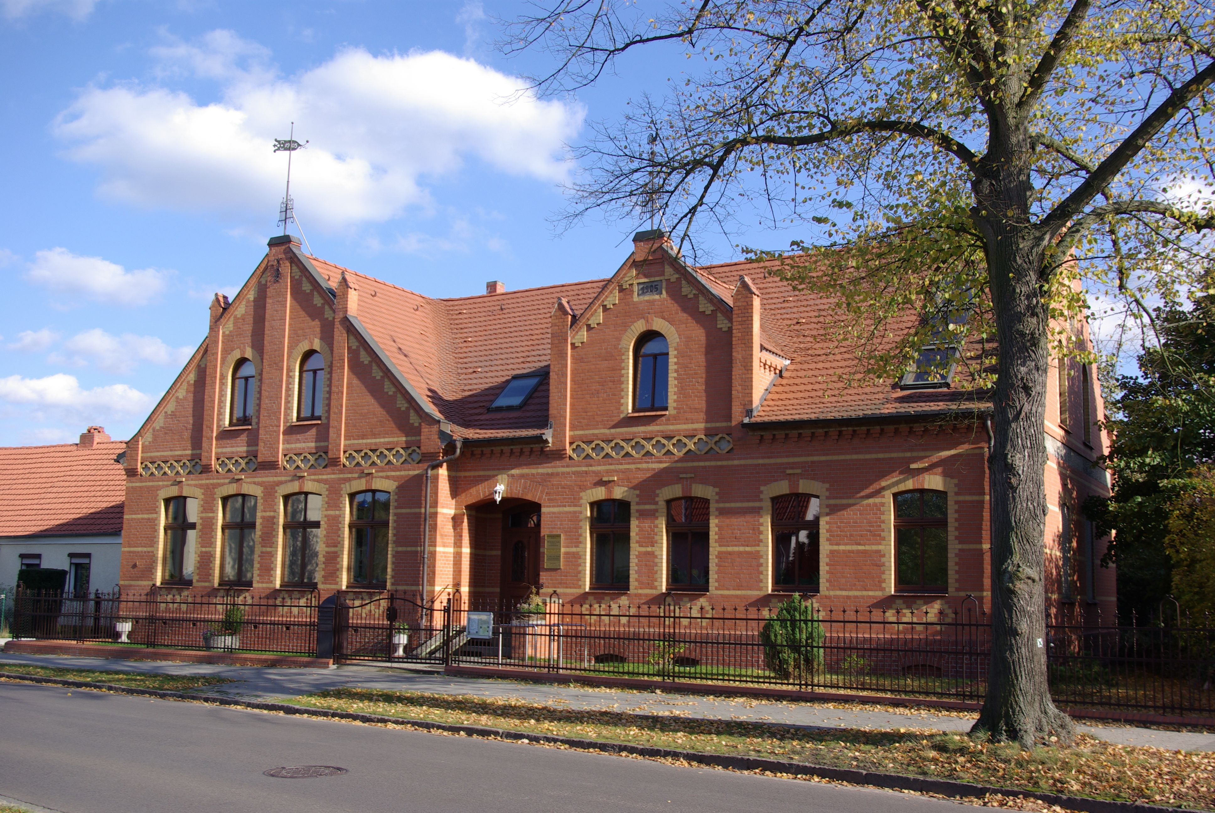 Bestensee in Brandenburg. Das haus in der Königswusterhauserner STraße 4 war die Dorfschule. Das Haus steht unter Denkmalschutz.